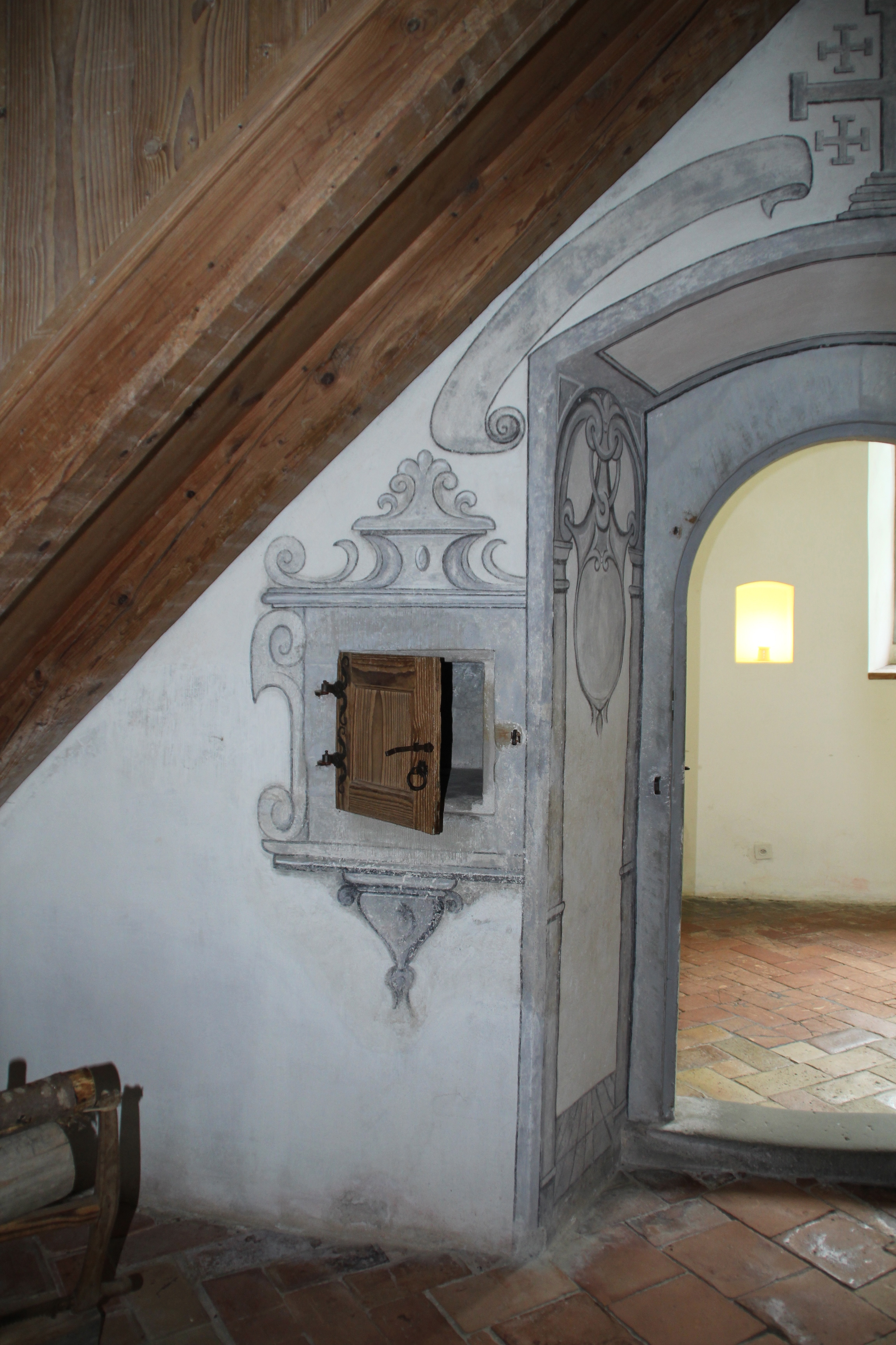 Kartause Ittingen Zellentür mit Durchreiche